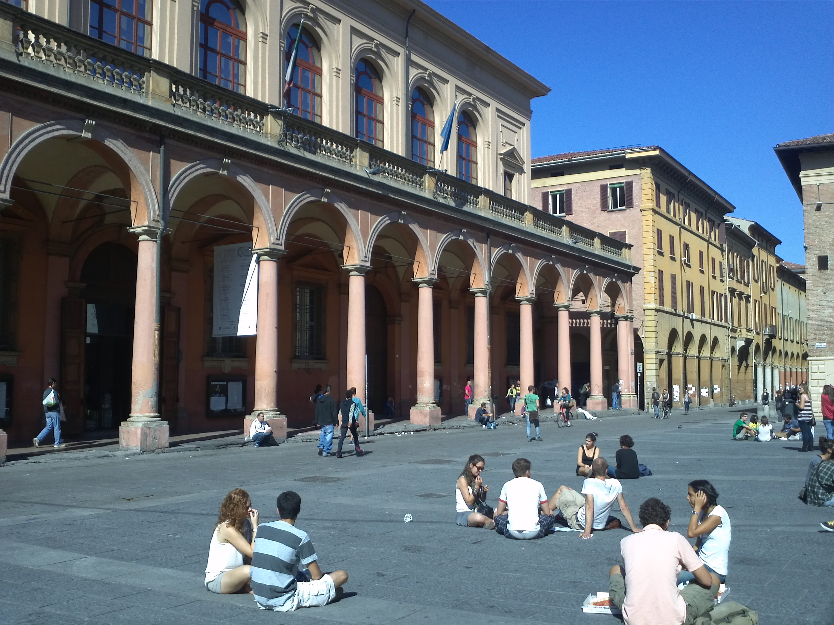 Piazza Verdi - MIBAC This is a photo of a monument which is part of cultural heritage of Italy.